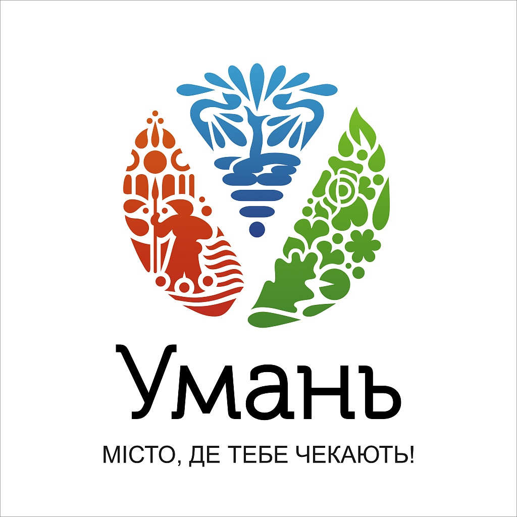 Логотип міста Умань, прийнятий 2016 року, авторства Євгенія Когута